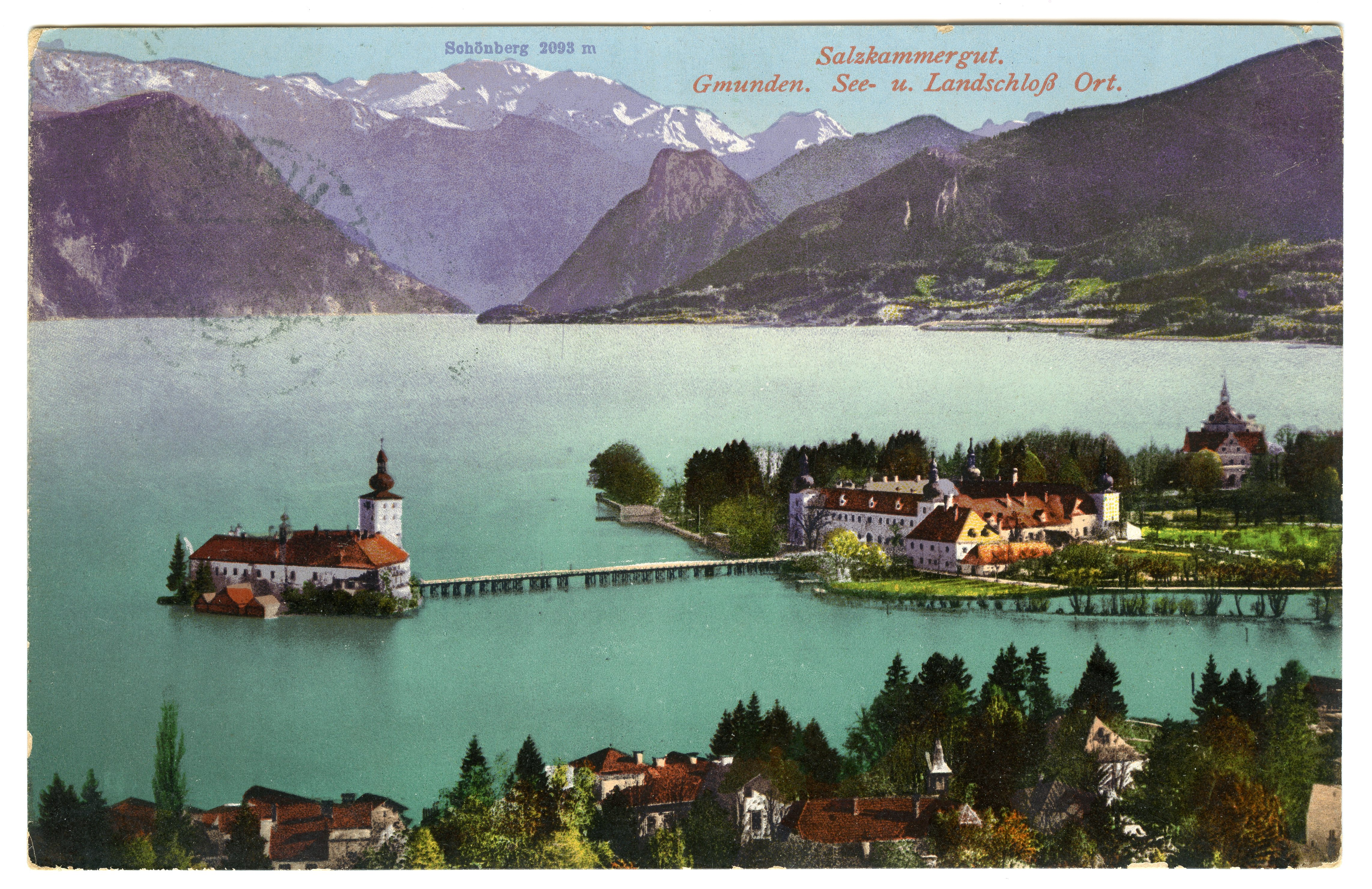 Widokówka z 1915 r. z widokiem Zamku Ort na jeziorze Traunsee, z obiegu, wysłana 17 VIII 1916 r. Wydawca: "1915. F.E. Brandt in Gmunden. Photochromiekarte No. 1350". Pocztówka znajduje się w zbiorze prywatnym Roberta Pieńkowskiego z Wrocławia